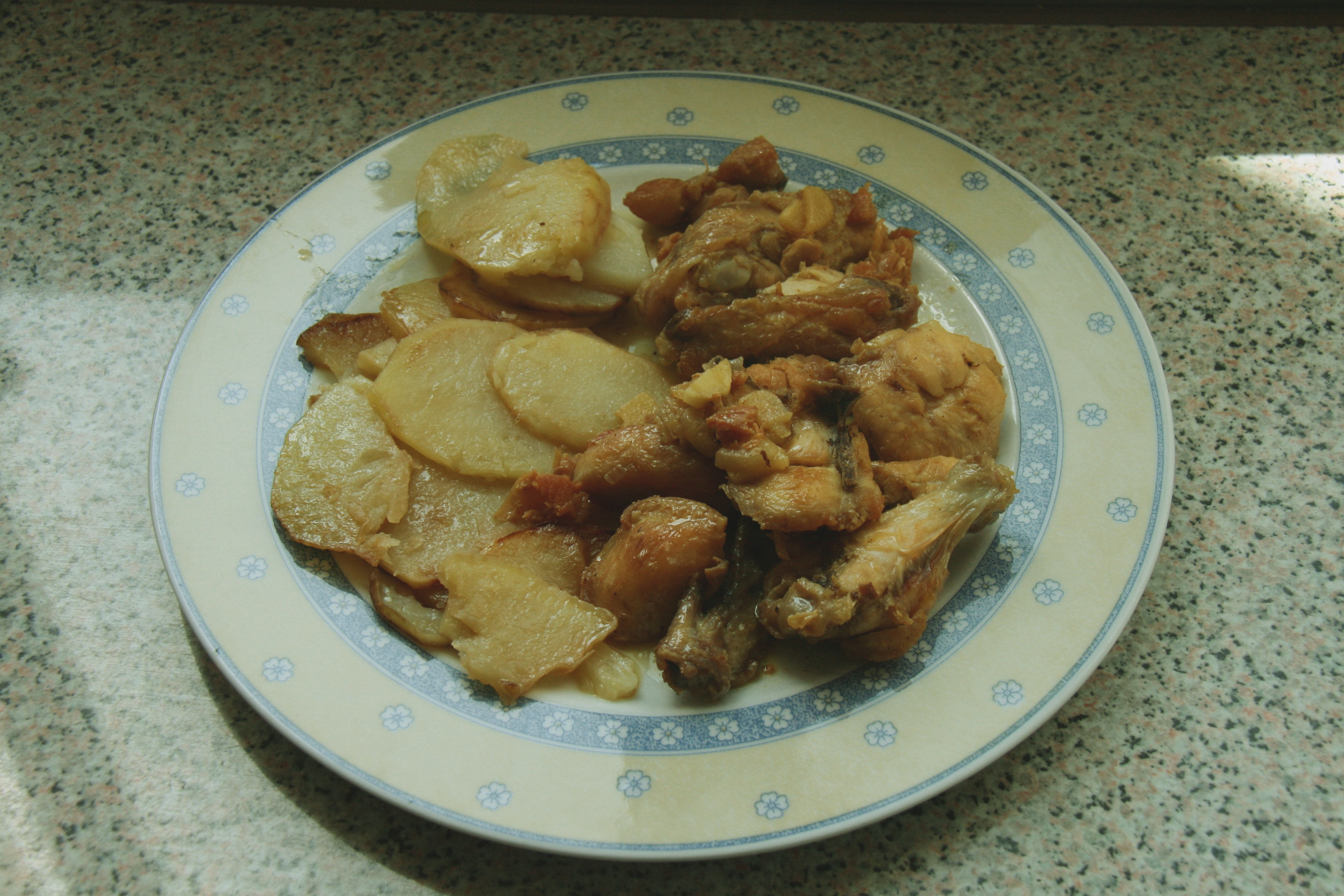 Pollo al ajillo (con guanición de patatas panaderas)